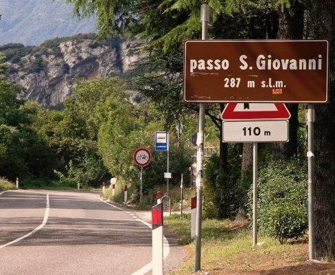 Passo San Giovanni (287 m. s.l.m. - Provincia di Trento)